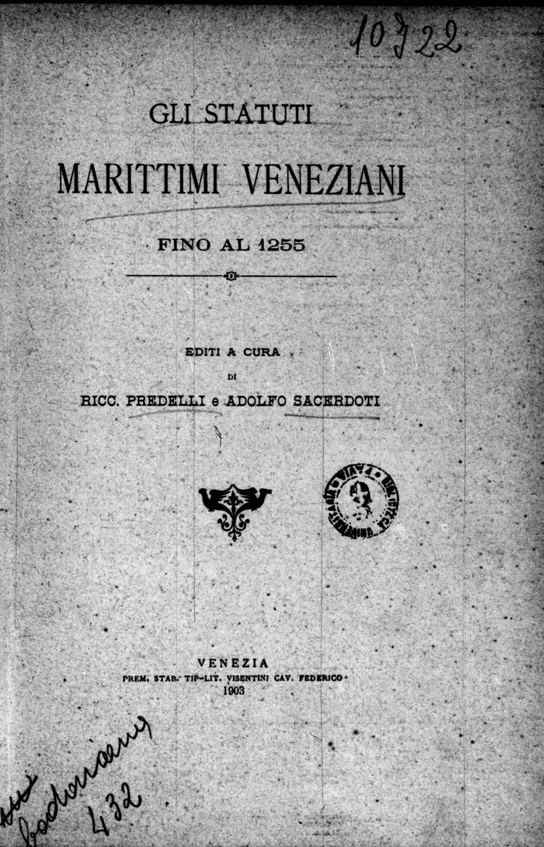 Frontespizio